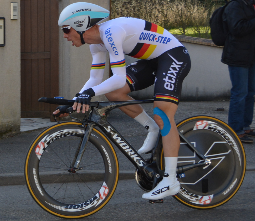 Tony Martin à Paris-Nice 2015